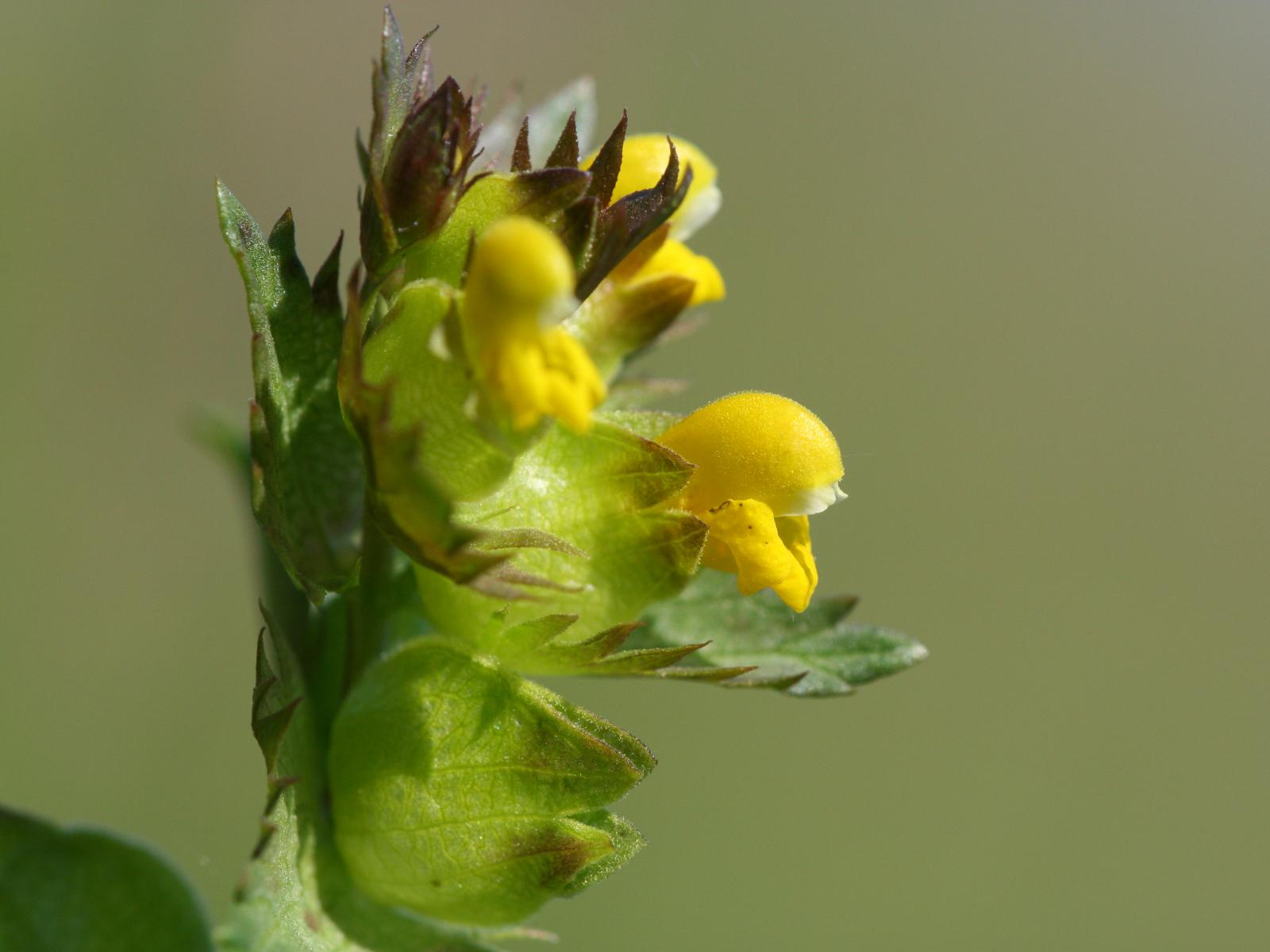 Kleiner Klappertop (Rhinanthus minor)